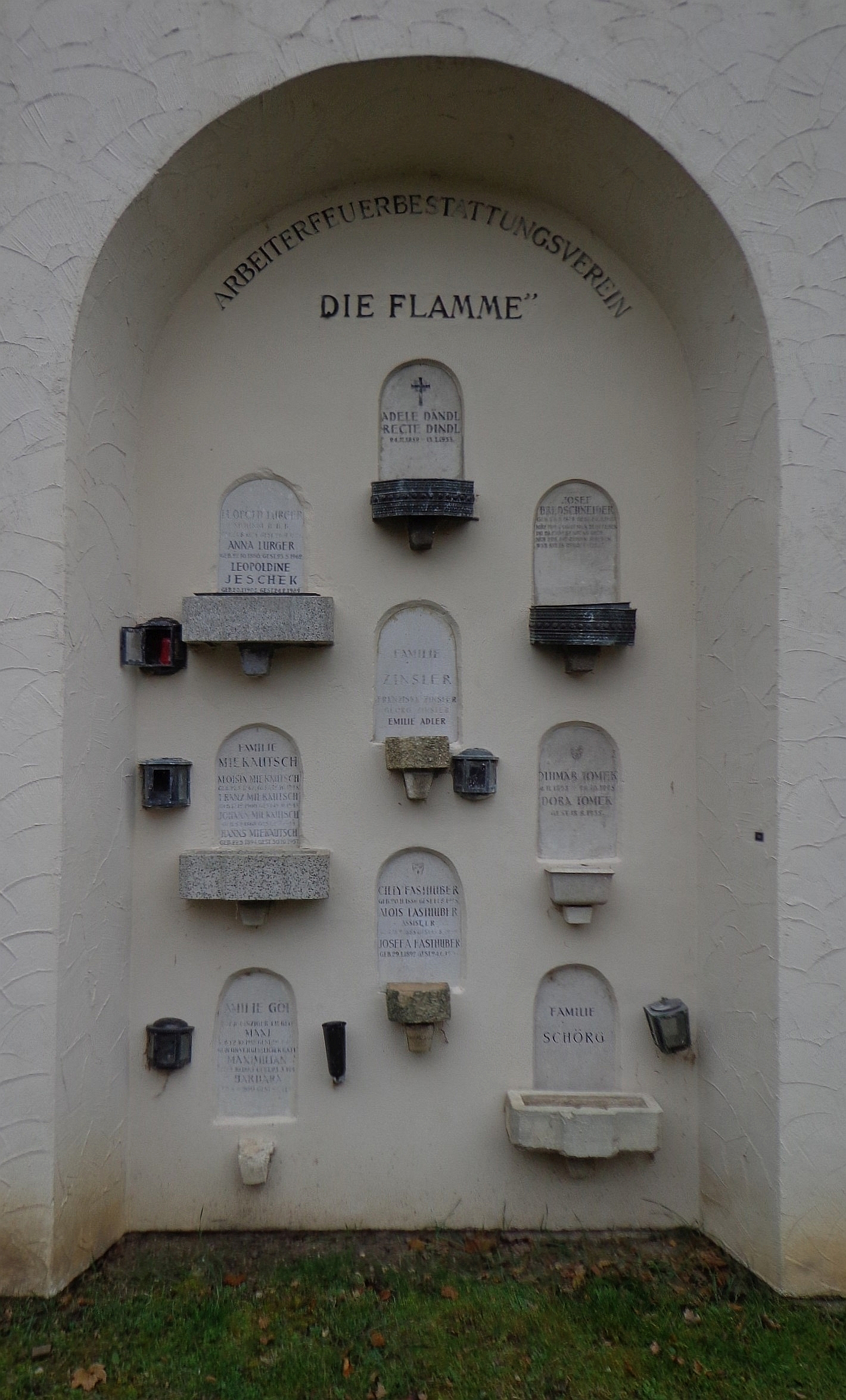 Feuerhalle Simmering - Abteilung MR (Umfassungsmauer): Urnen-Sammelgrabanlage des Arbeiter-Feuerbestattungsvereins "Die Flamme"